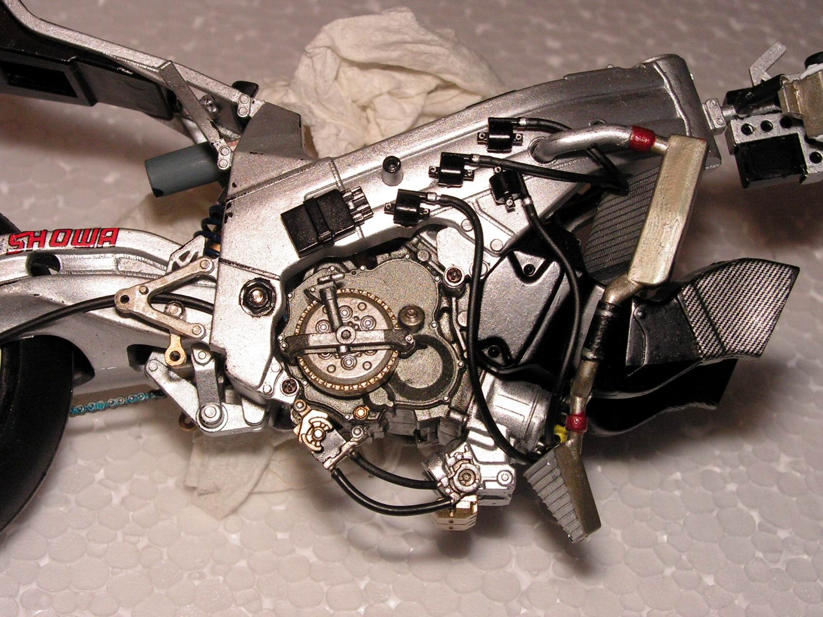 WIP maquette RGV 500 tamiya K Roberts Jr 1998